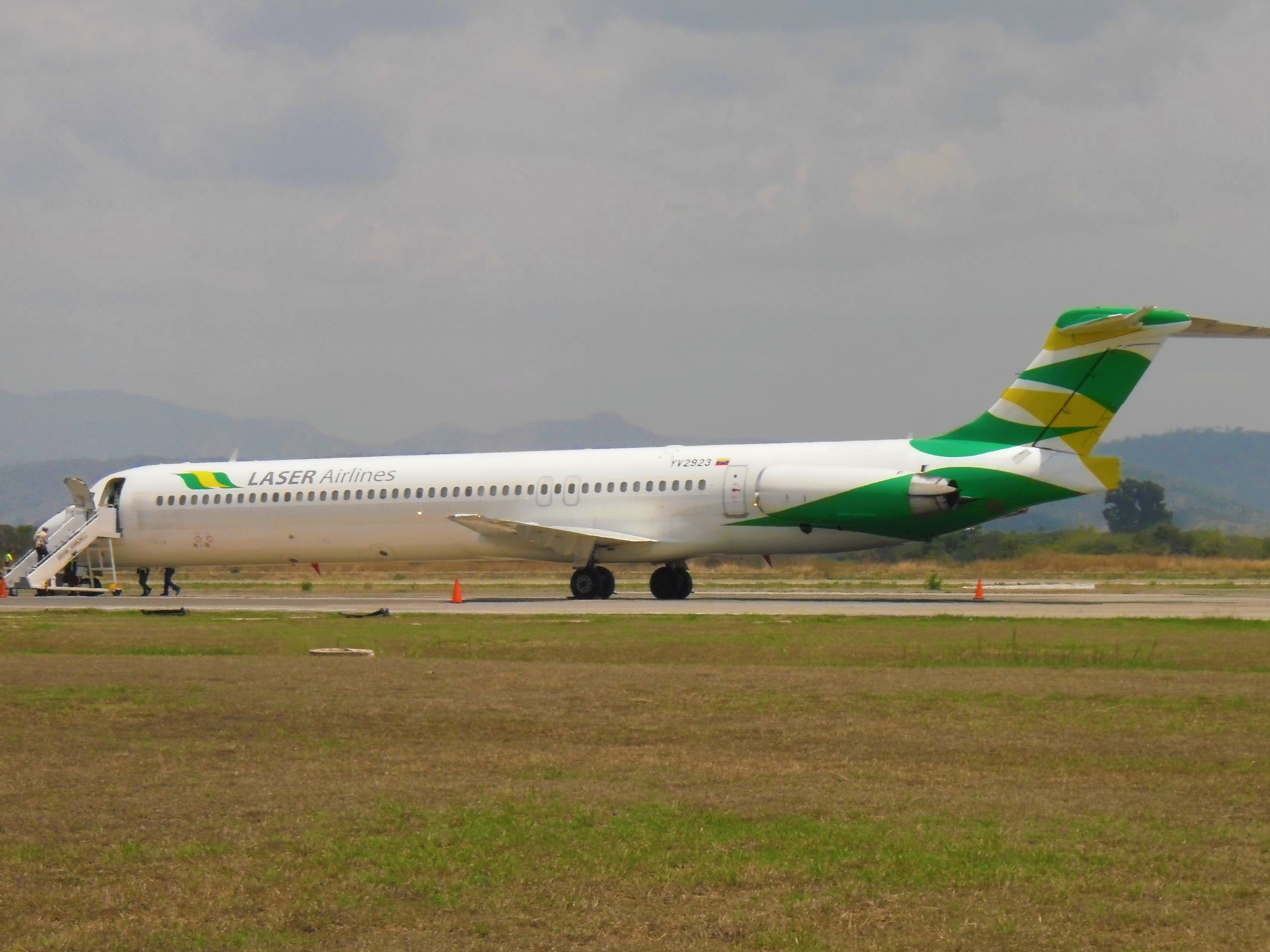 Laser Airlines en Rampa Internacional de el Aeropuerto internacional Arturo Michelena